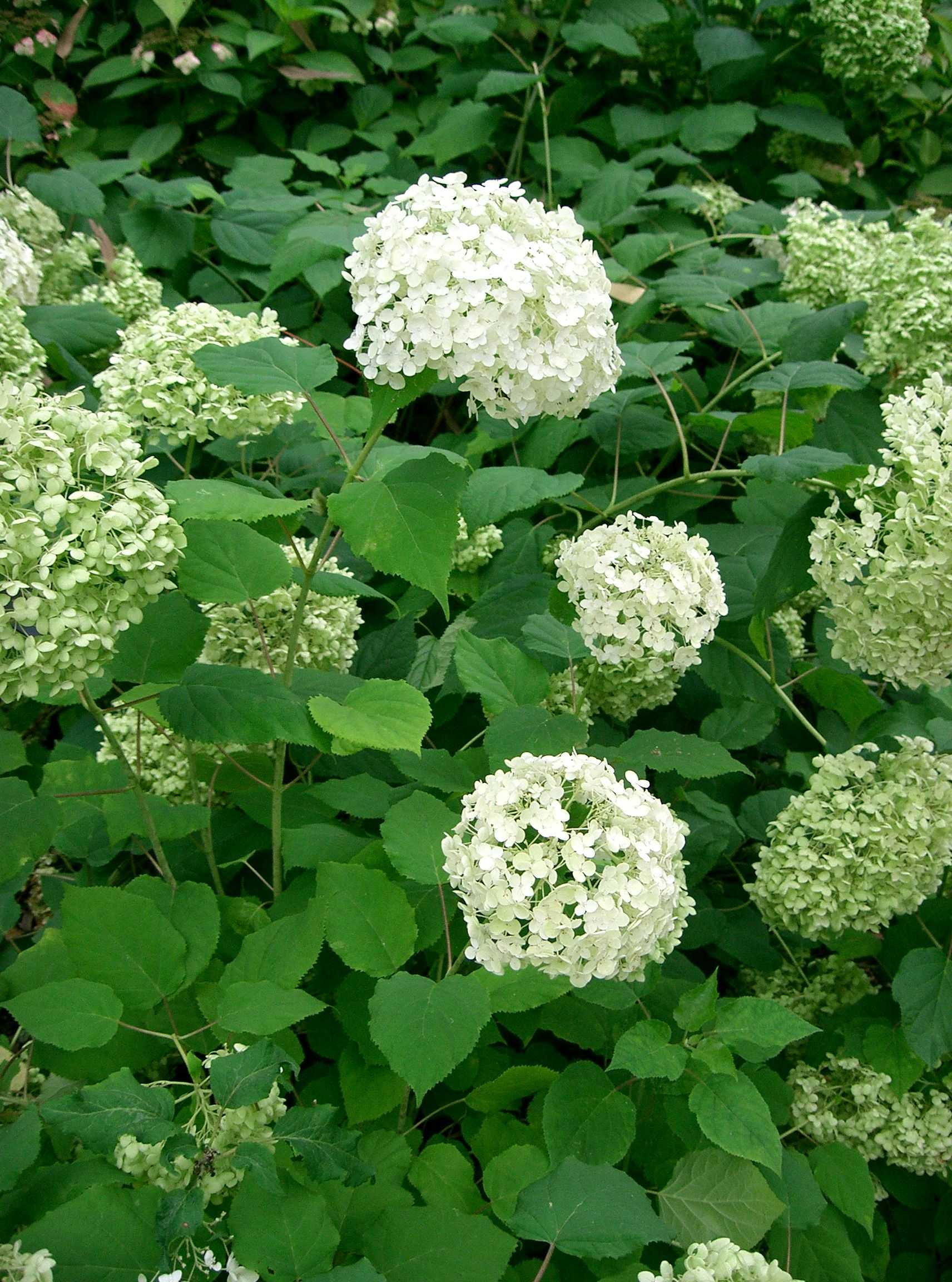 Hydrangea arborescens 'annabelle'